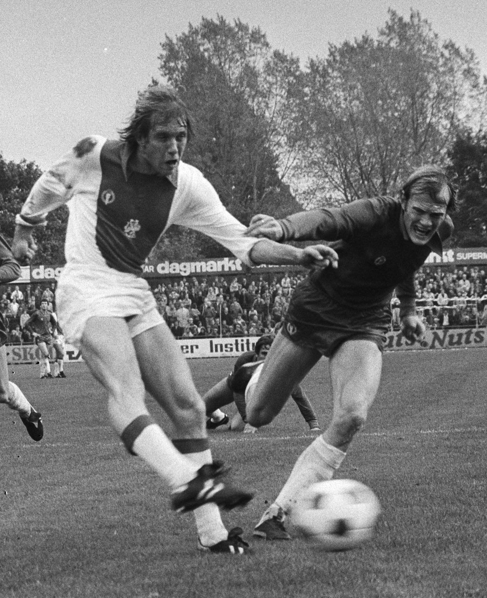 Collectie / Archief : Fotocollectie Anefo Reportage / Serie : Haarlem - Ajax 2-4 (KNVB beker) Beschrijving : Jensen scoort voor Ajax het eerste doelpunt, rechts Huyg van Haarlem Datum : 14 oktober 1979 Locatie : Haarlem, Noord-Holland Trefwoorden : sport, voetbal Persoonsnaam : Huyg, Piet, Jensen, Henning Instellingsnaam : AJAX, KNVB Fotograaf : Suyk, Koen / Anefo Auteursrechthebbende : Nationaal Archief Materiaalsoort : Negatief (zwart/wit) Nummer archiefinventaris : bekijk toegang 2.24.01.05 Bestanddeelnummer : 930-4917